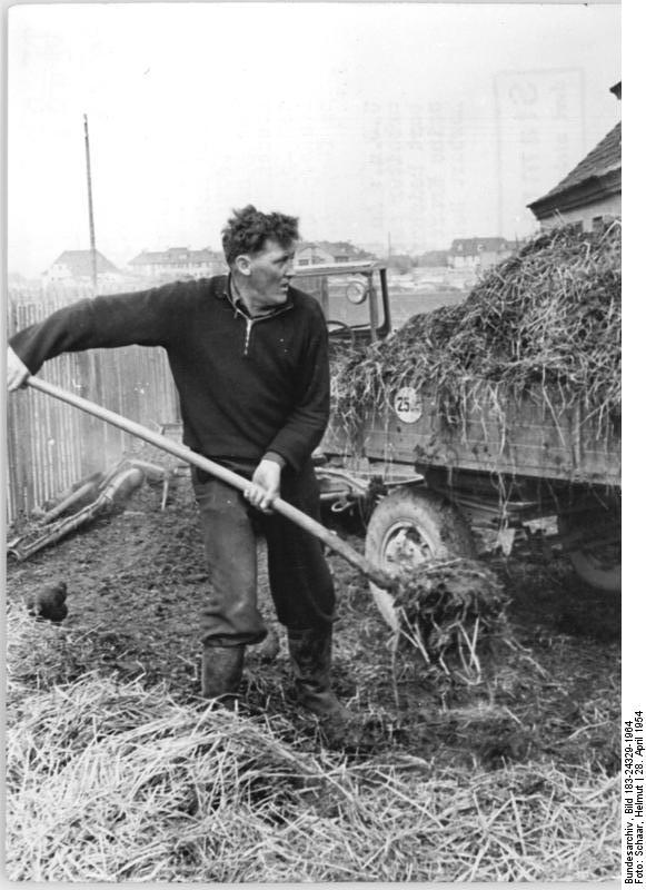 Nordhausen, Neubauer bei der Arbeit Zentralbild Schaar 28.4.1954 Industriearbeiter arbeiten auf dem Lande. Immer mehr Industriearbeiter erkannten die Notwendigkeit, zur Festigung der Bündnisse zwischen Stadt und Land in den Maschinen- und Traktorenstationen, Produktionsgenossenschaften und Volksgütern zu arbeiten. Damit sind sie dem Appell der Sozialistischen Einheitspartei Deutschlands gefolgt, den weiteren Aubau unserer Landwirtschaft zu fördern. UBz: Am 9. April 1954 übernahm der ehemalige Transportarbeiter aus dem Ifa-Schlepperwerk Nordhausen, Kollege Herbert Reichardt einen neuen Bauernhof bei Nordhausen, um seine Kraft dem Lande zur Verfügung zu stellen. Neubauer Norbert Reichardt beim Mistladen für das Kartoffelfeld.